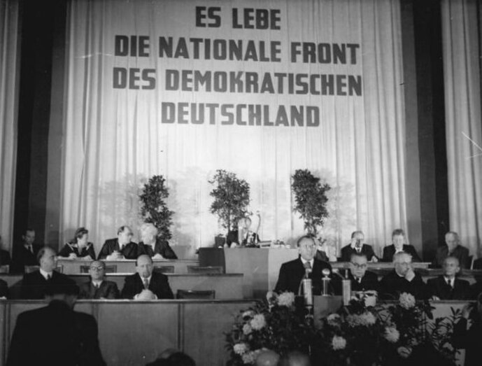 Zentralbild 12.10.1949. Die gesamtdeutsche Regierung. Am 12. Oktober 1949 trat die Volkskammer zu ihrer zweiten Sitzung zusammen, um die Zusammensetzung der deutschen Regierung bekanntzugeben und eine Regierungserklärung abzugeben. UBz: Das Präsidium der Provisorischen Volkskammer Vordere Reihe v.l.n.r.: Steinhoff, Dertinger, Ulbricht, Grotewohl, Kastner, Nuschke, Steidle. Hintere Reihe v.l.n.r.: Hoffmann, Malter, Loehr, Matern, Dieckmann, Ebert, Schmidt, Geske. Aufn.: Illus-Igel 4147-49